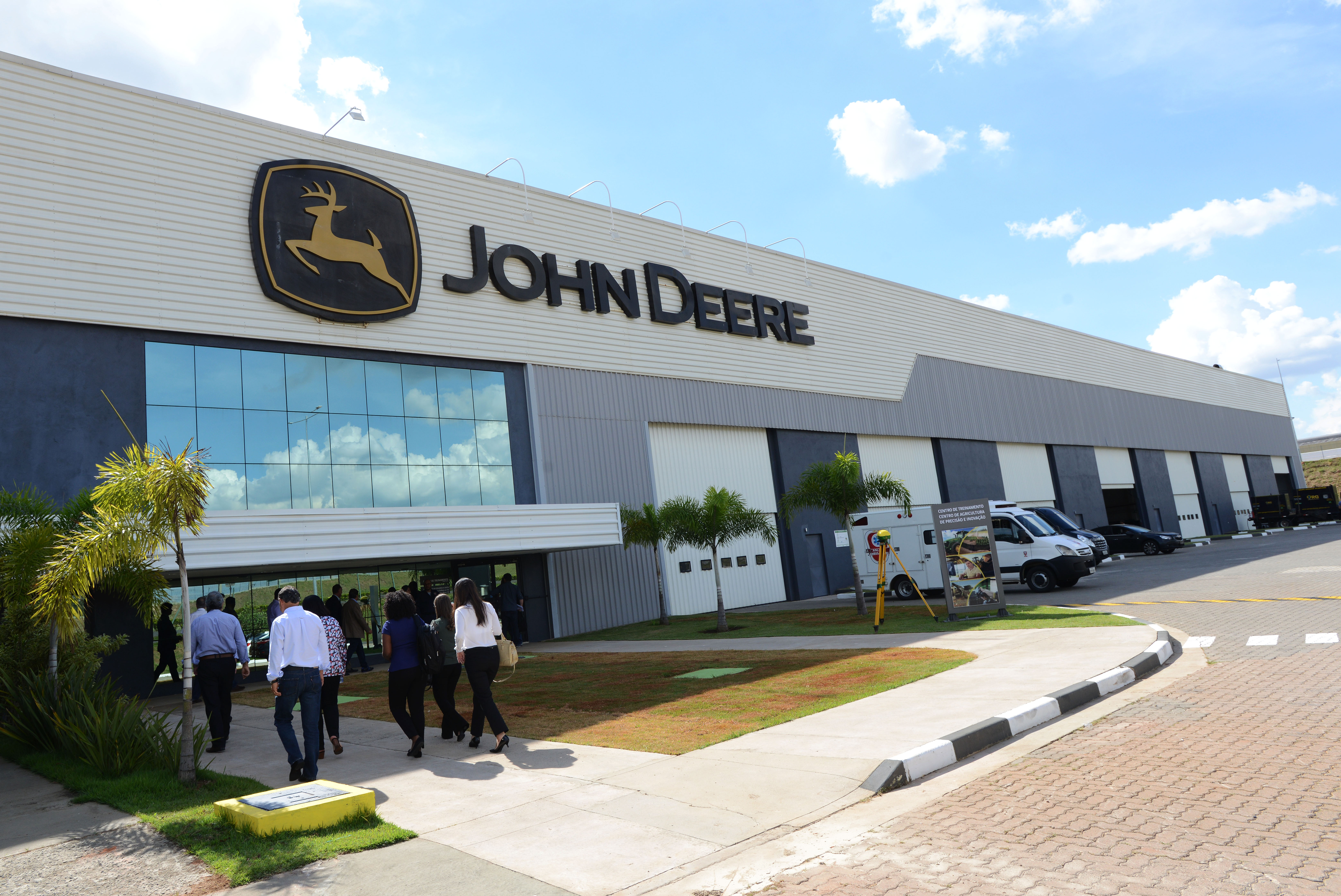 Foto Carlos Bassan